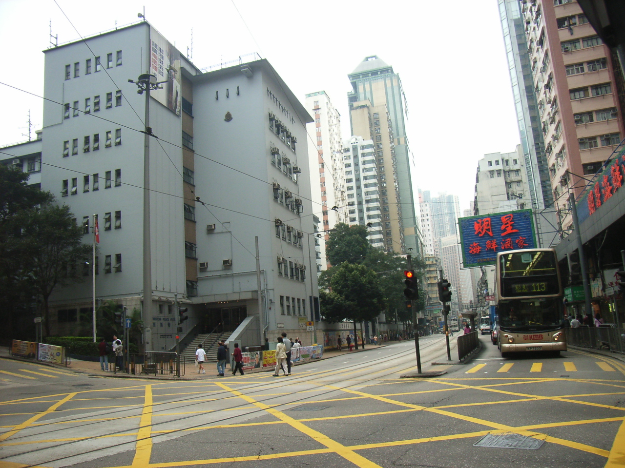 Sai Ying Pun 西營盤zh:西邊街、德輔道西與zh:皇后大道西交界的zh:西區警署又名七號差館